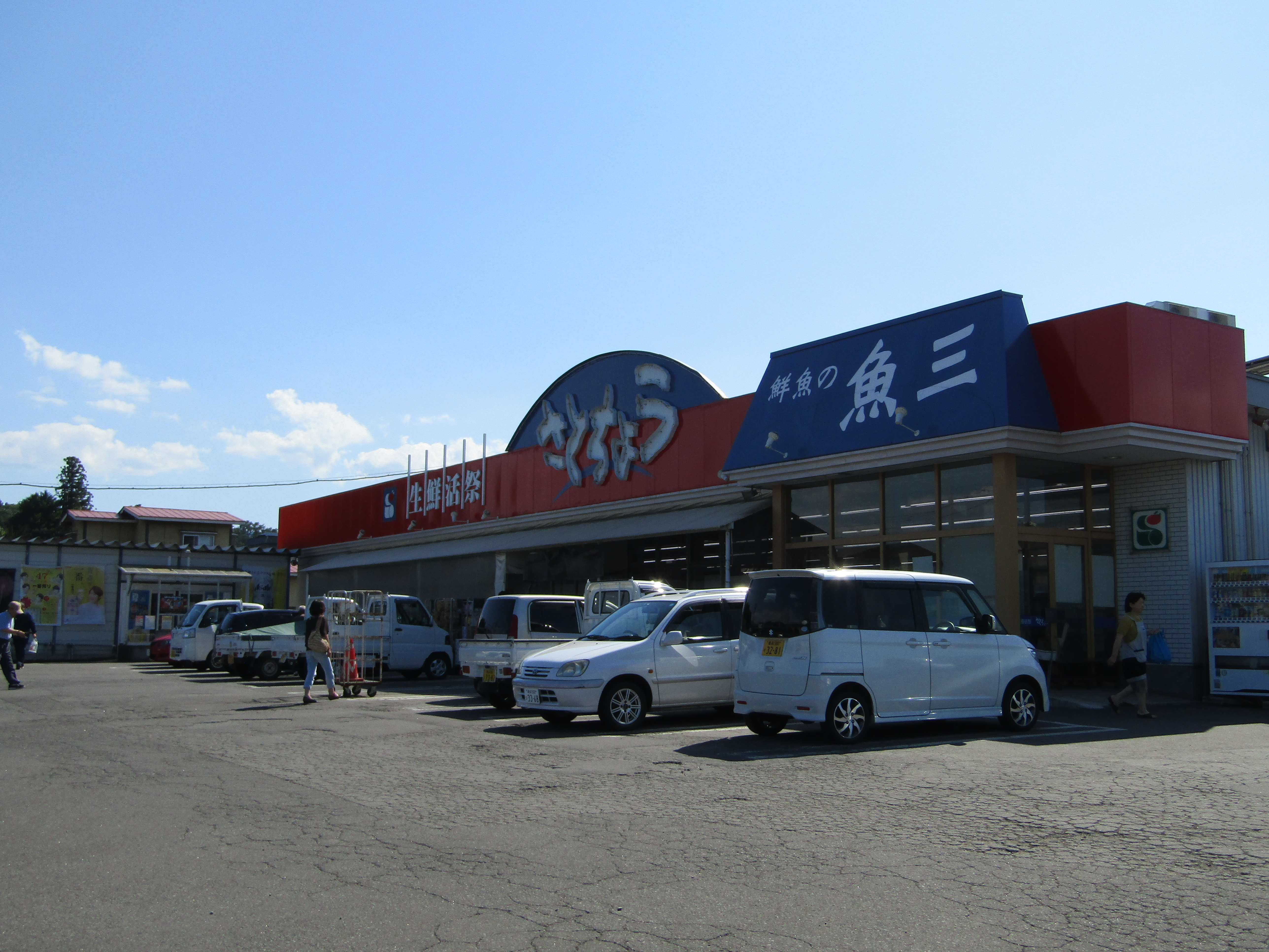 株式会社佐藤長・相馬店にて撮影。 1998年01月開店。旧：ウエルマート・相馬店。